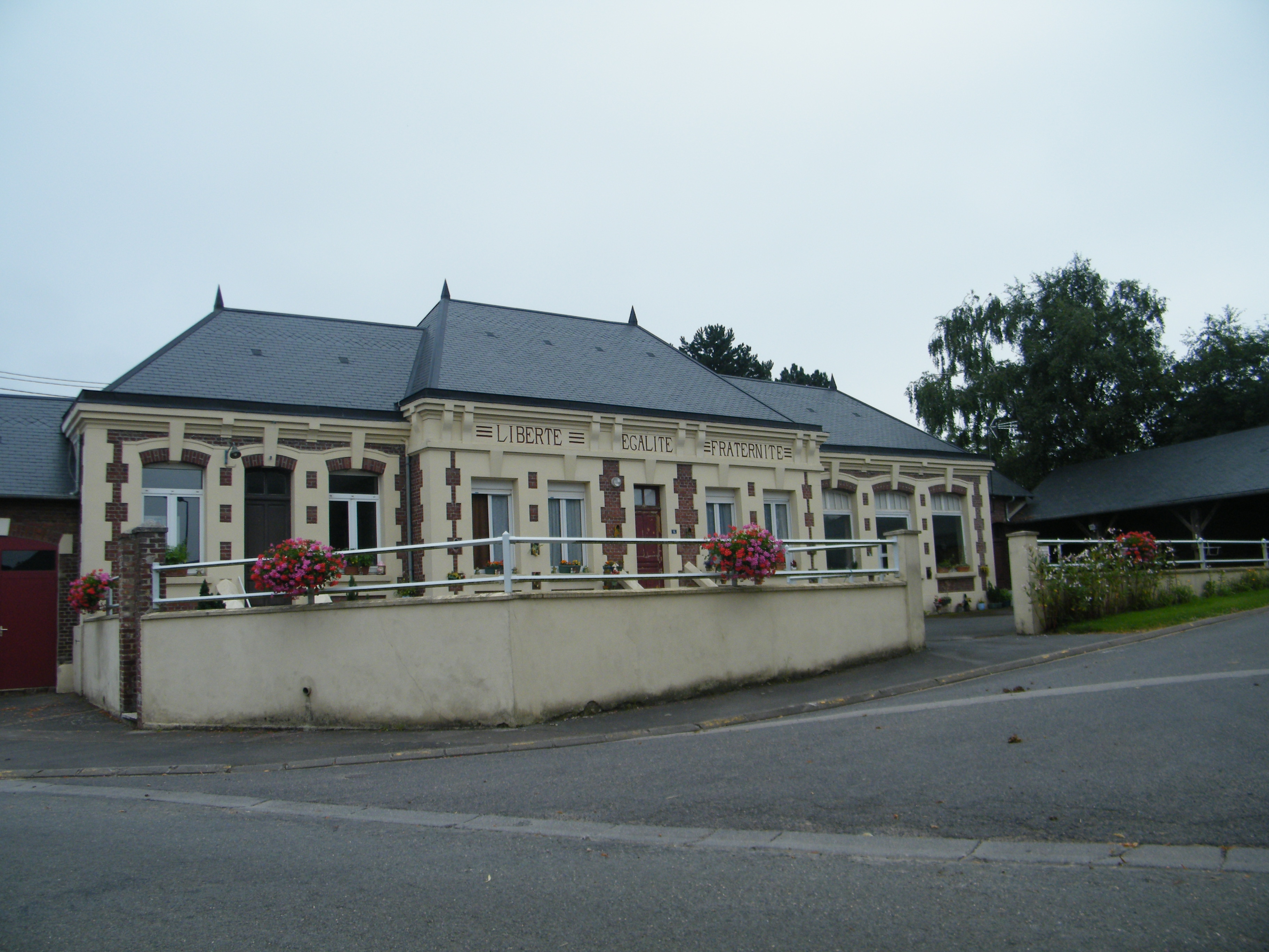 Mairie-école de Maurepas, Somme, France, reconstruite après la Première Guerre mondiale.